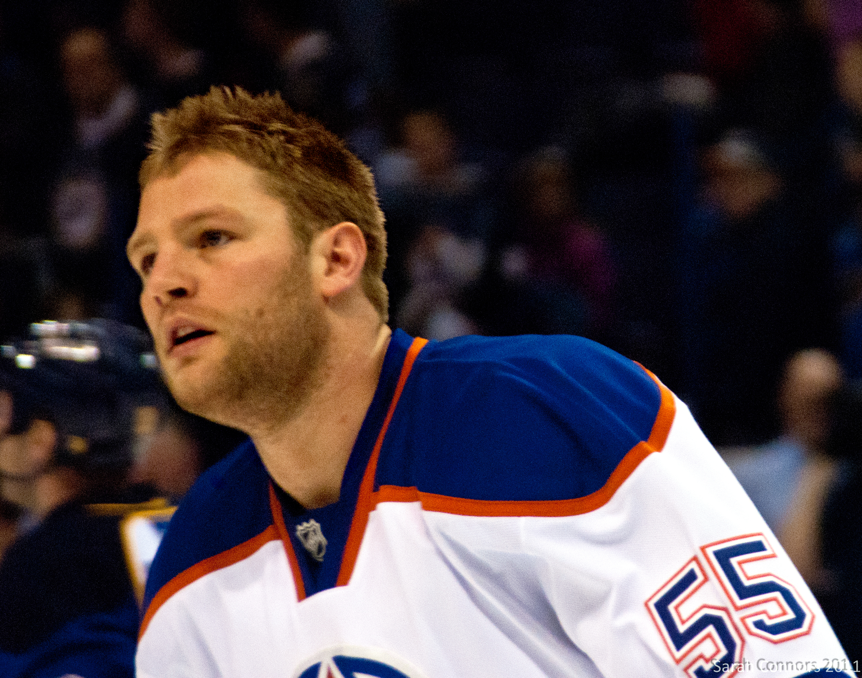 Ben Eager, 2012